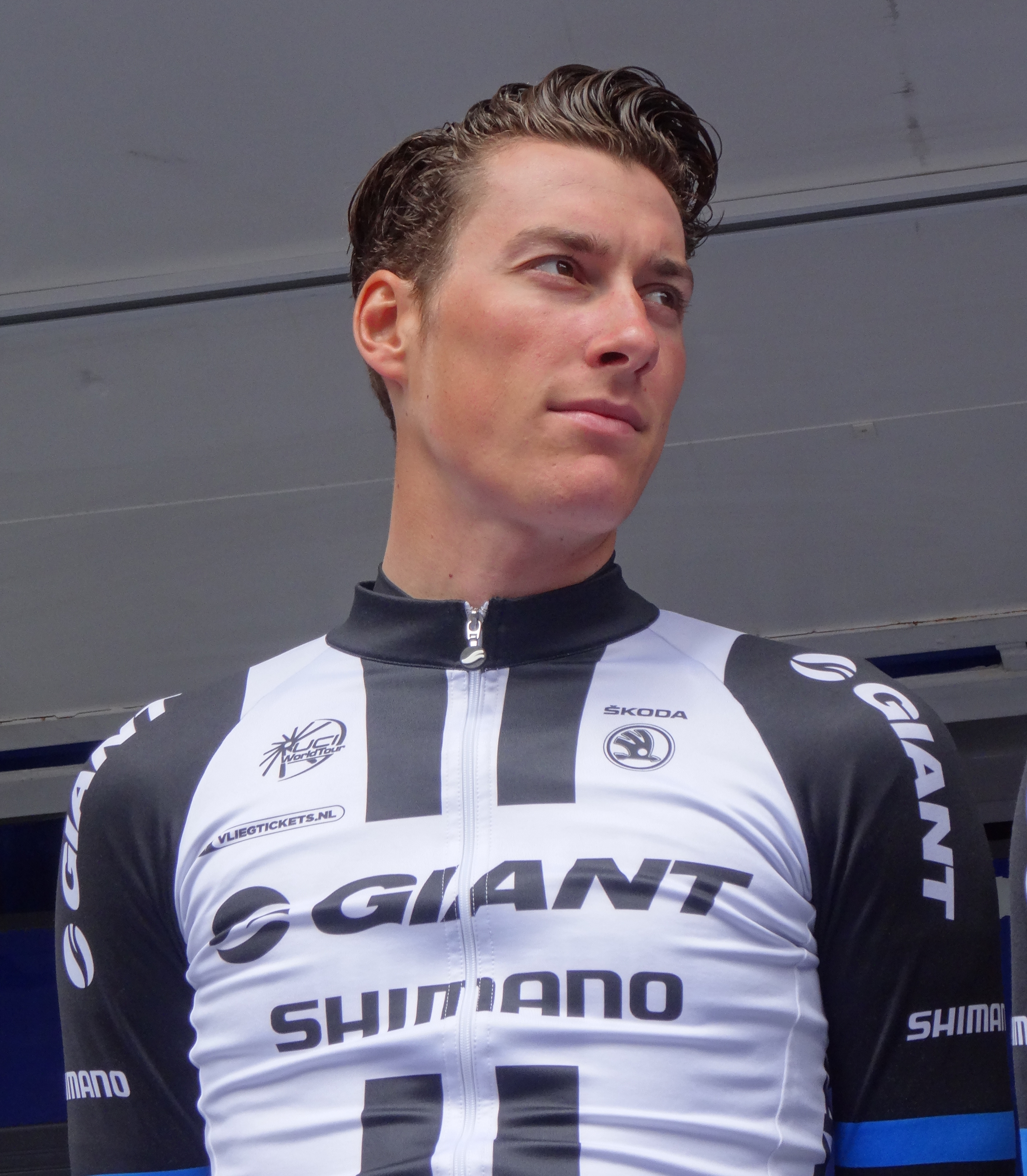 Reportage photographique réalisé le mercredi 7 mai 2014 au départ de la première étape de l'édition 2014 des Quatre jours de Dunkerque à Dunkerque, Nord, Nord-Pas-de-Calais, France. Depicted person: Ramon Sinkeldam Depicted team: Giant-Shimano